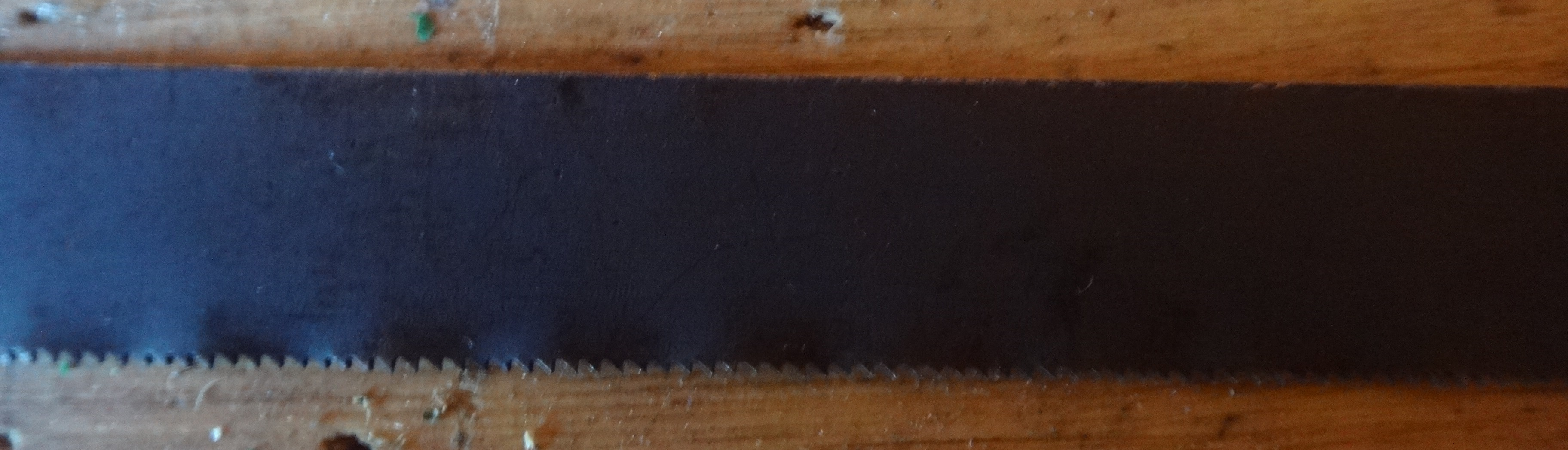 Зубья ножовки по металлу крупным планом